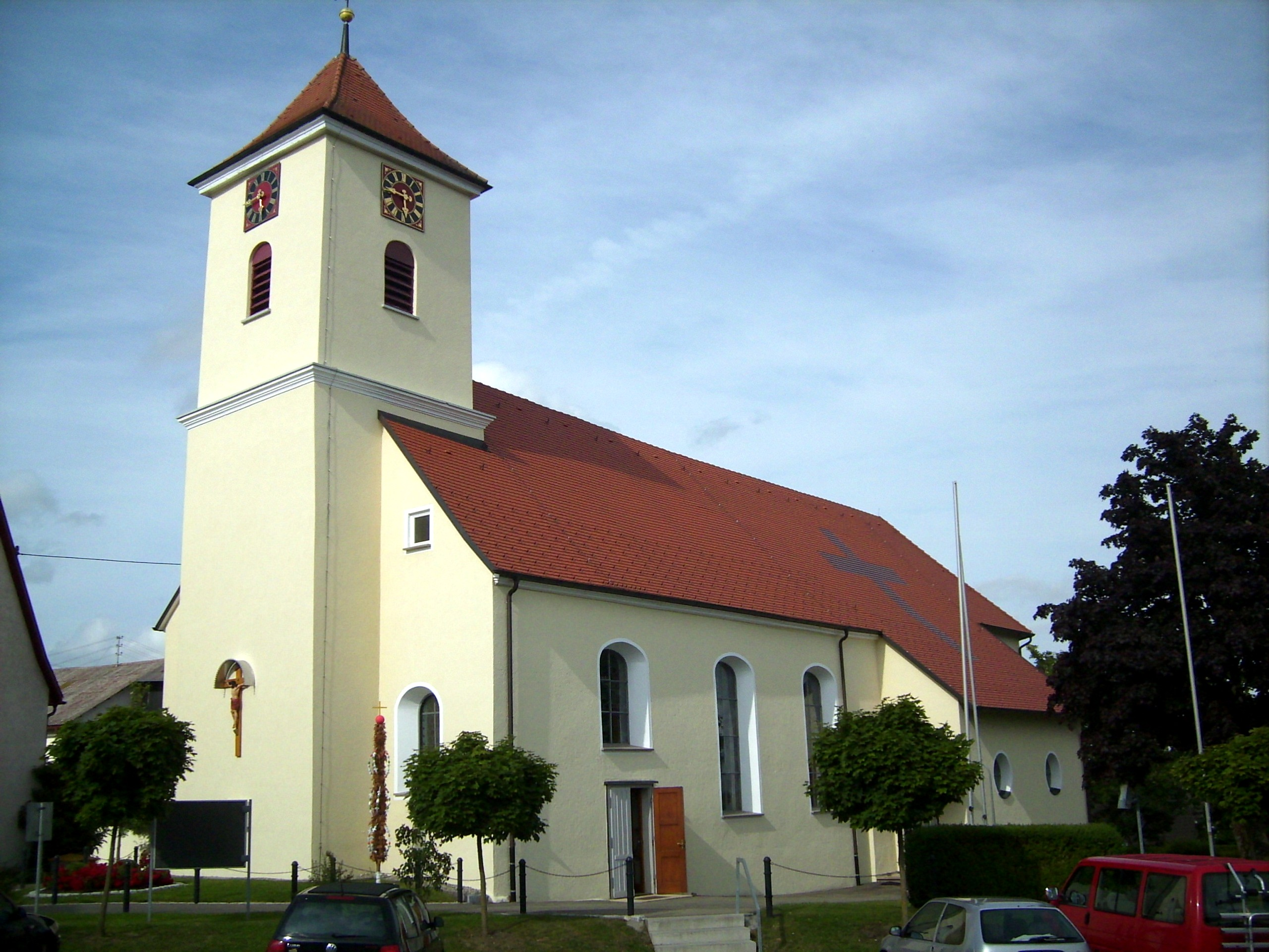 St. Agatha - die katholische Kirche von Heinstetten, Deutschland St. Agatha - the roman catholic church of Heinstetten, Germany